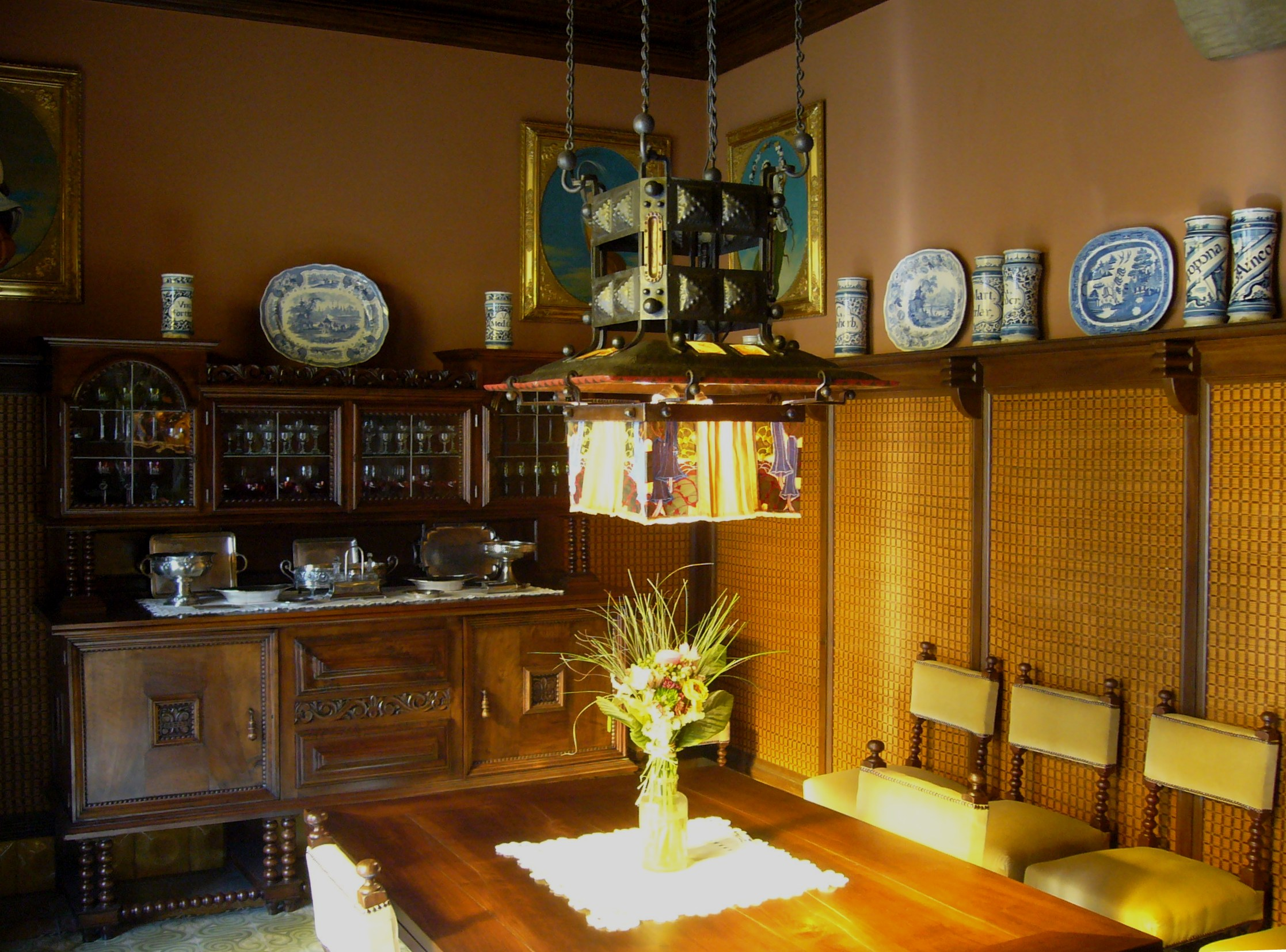 Reforma de tres cases entremitgeres